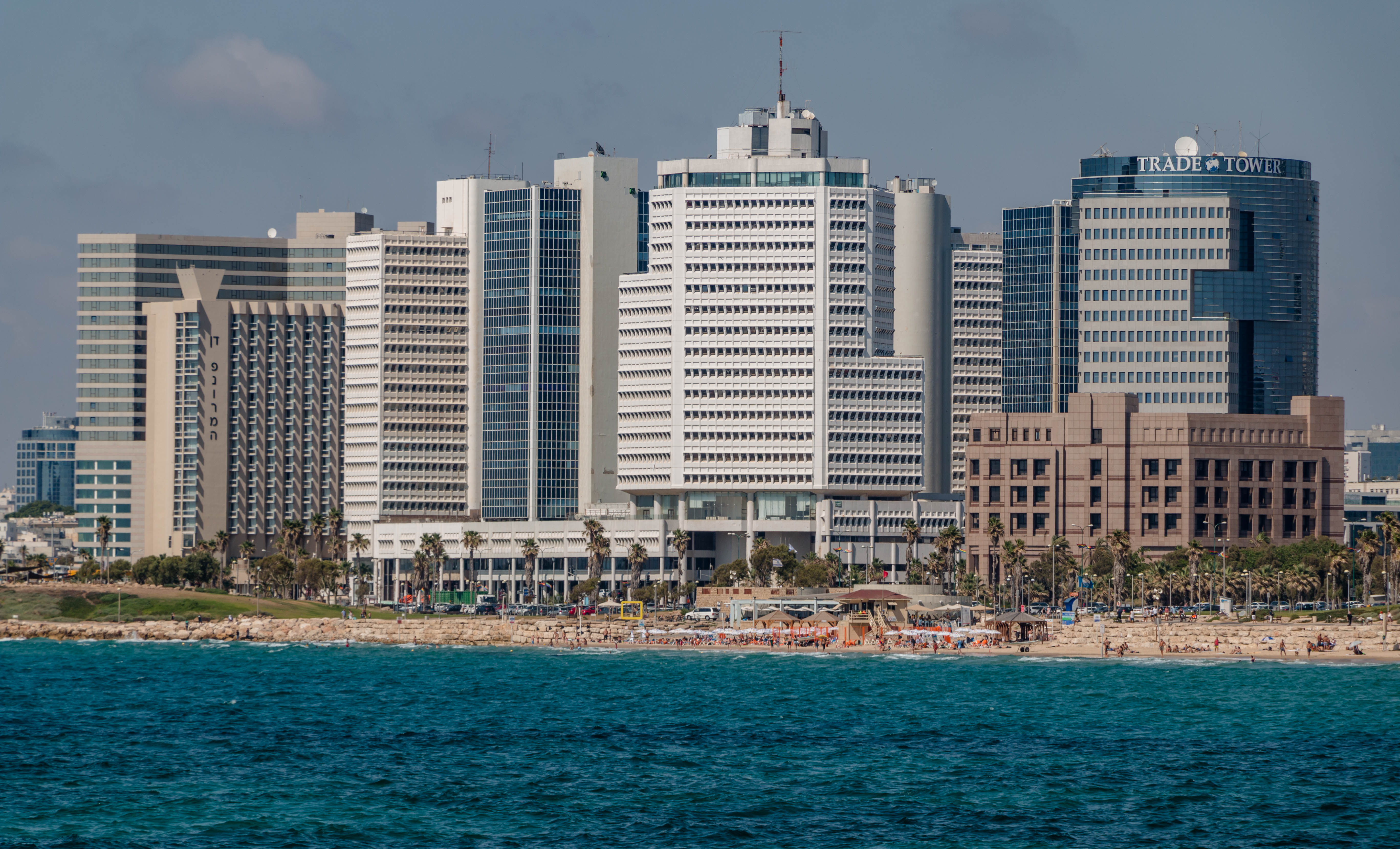 אזור עסקים